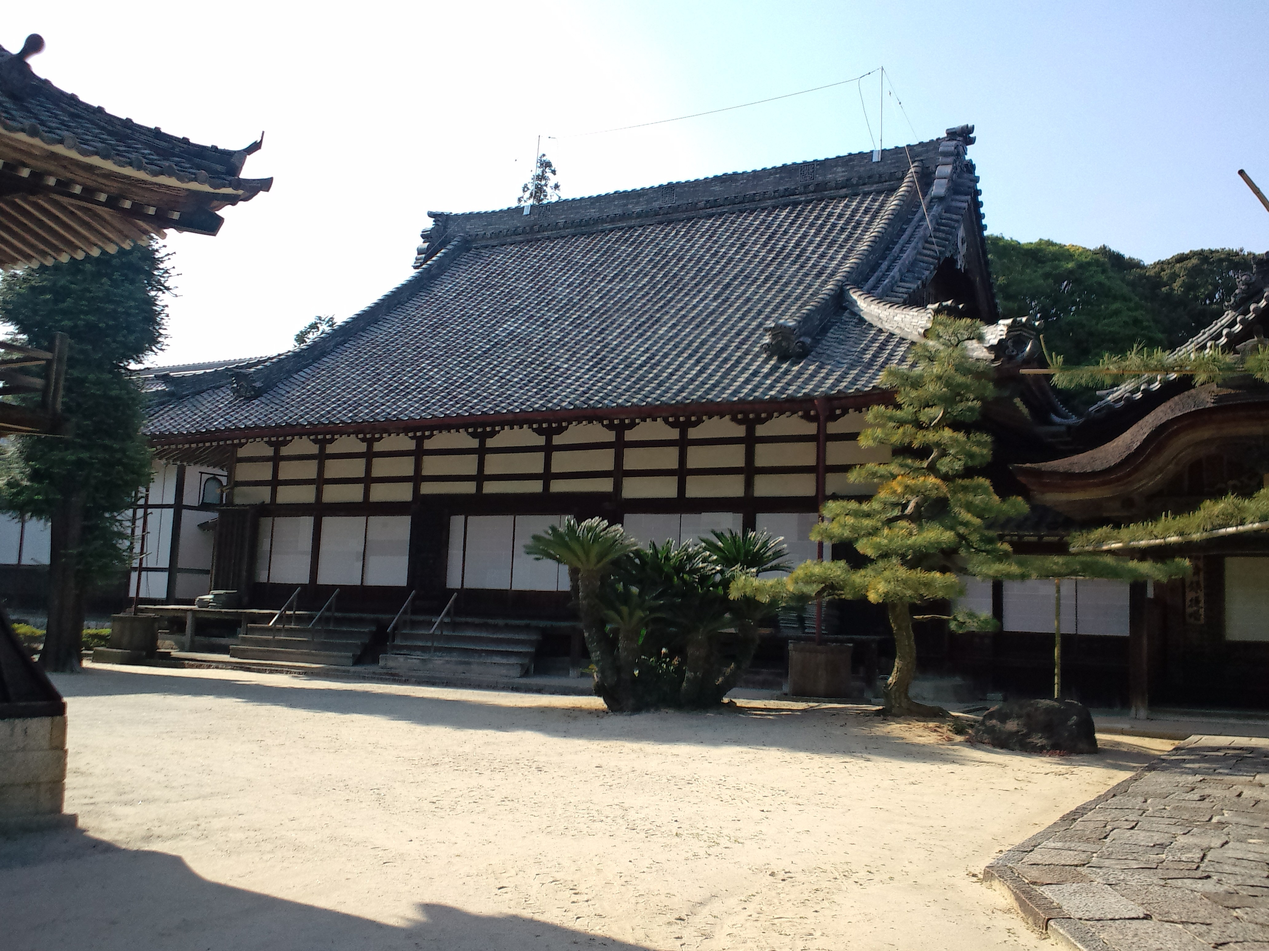 太平寺 本堂